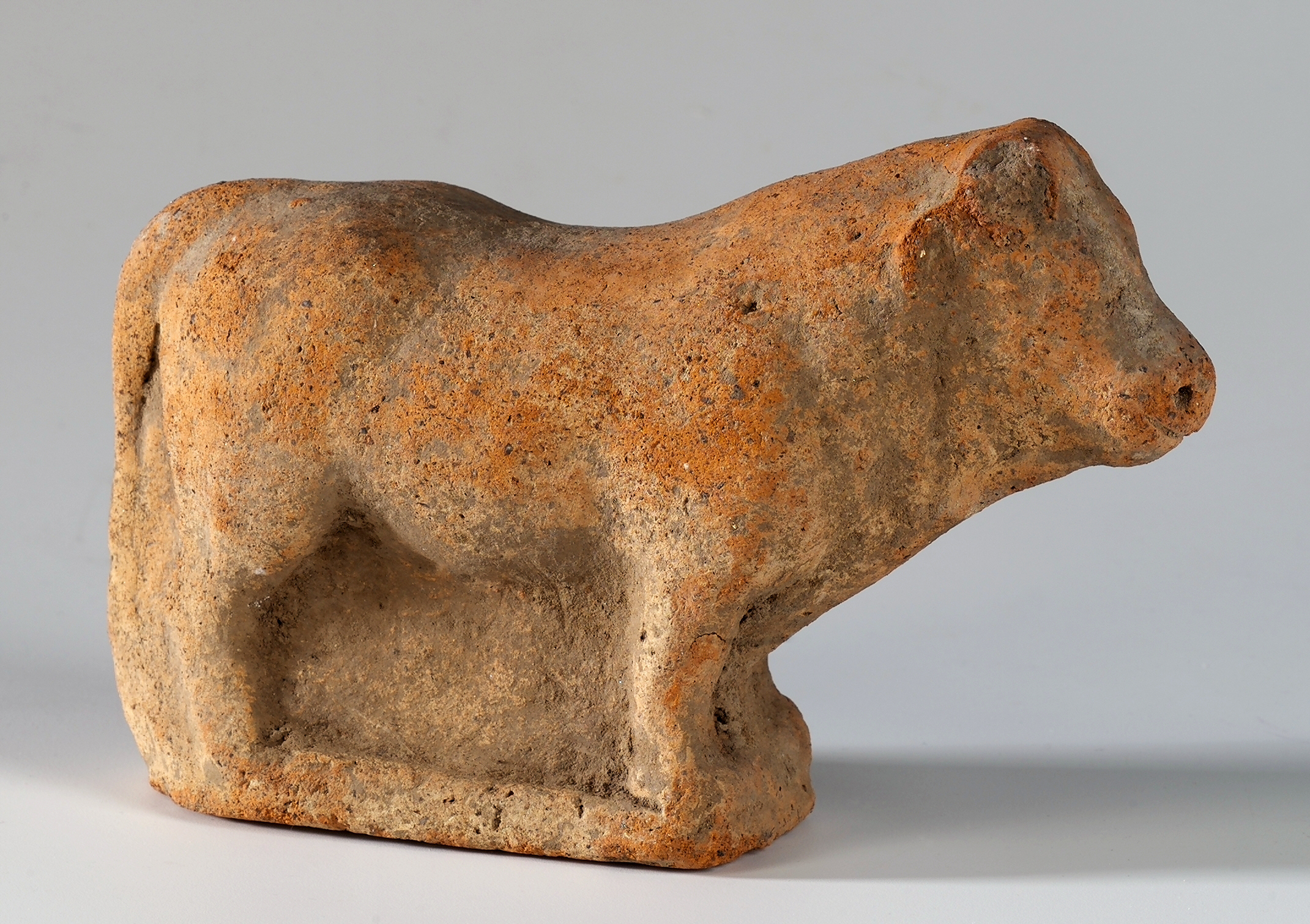 Brau sense banyes, vist de costat i buidat en la mateixa argila. Procedent de Calvi (Campania). Època hel·lenística del segle IV-II aC.